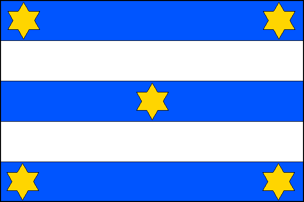 vlajka, Šišma, okres Přerov